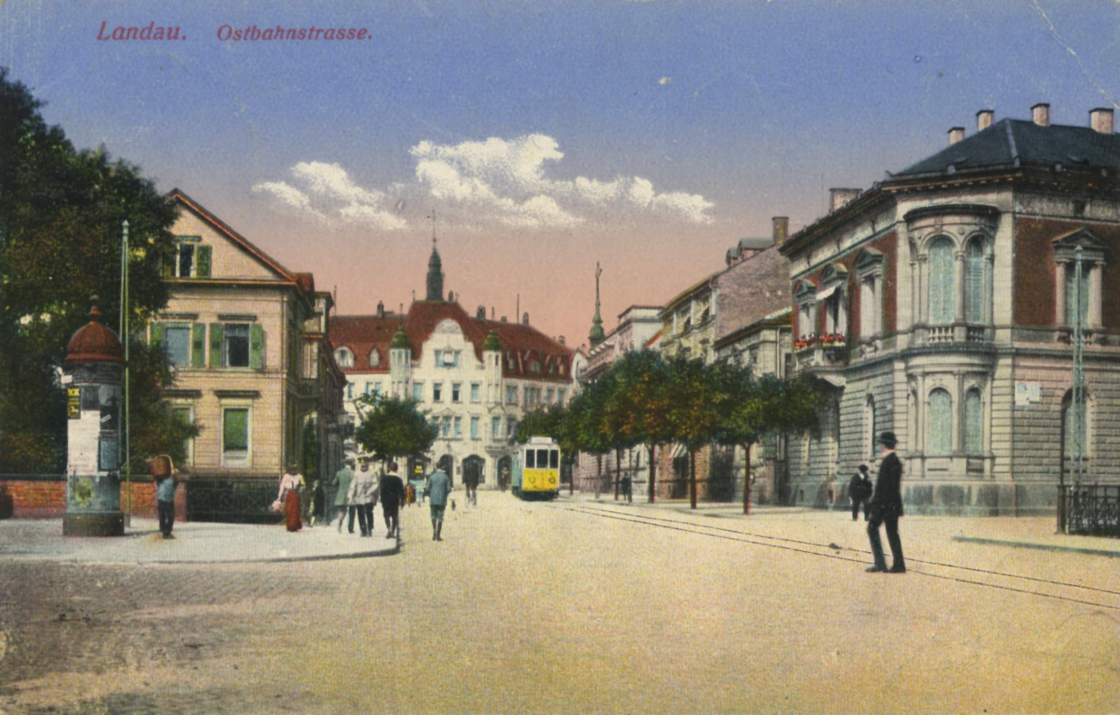 Ostbahnstraße